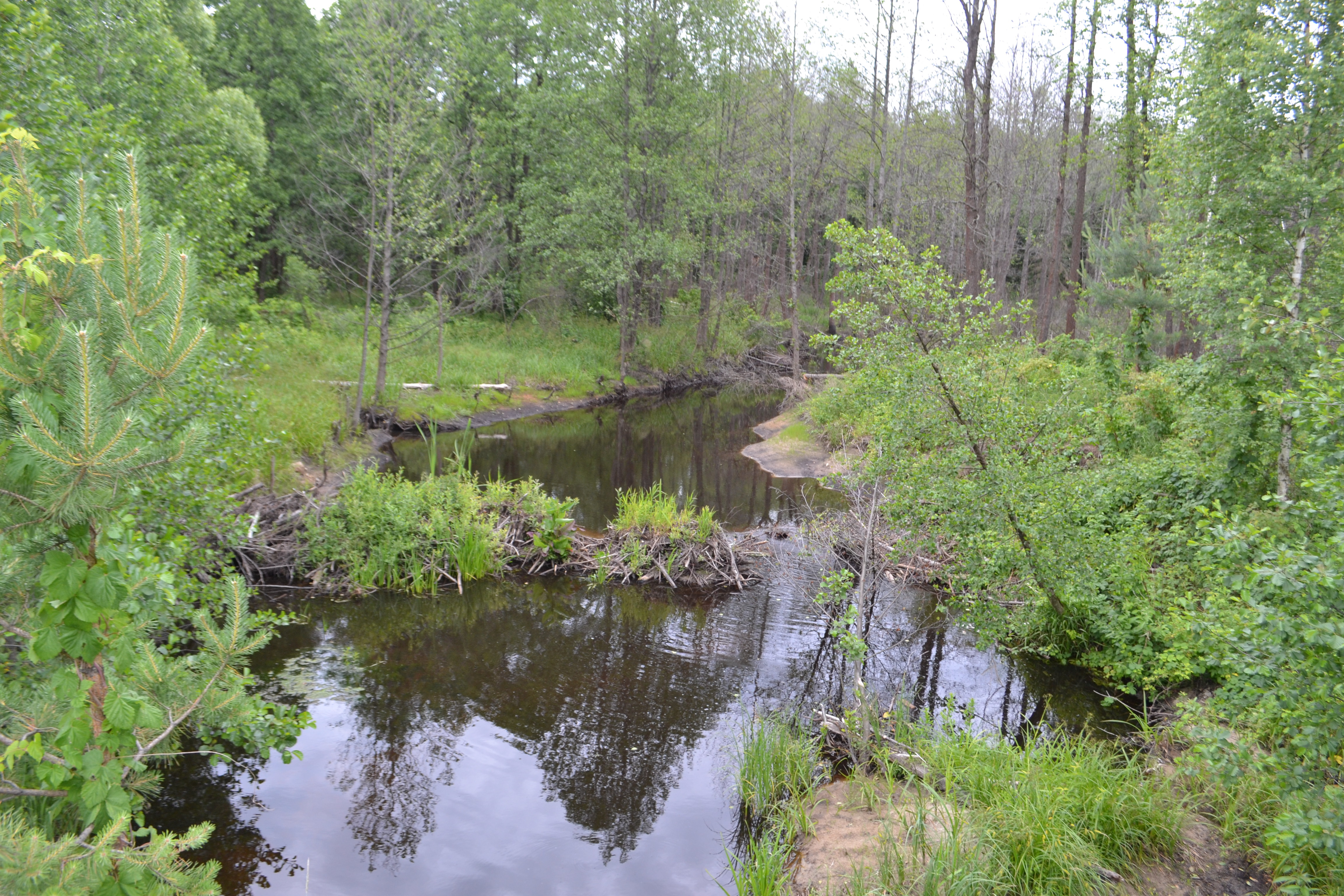 Река Чёрная (Шатурский район)